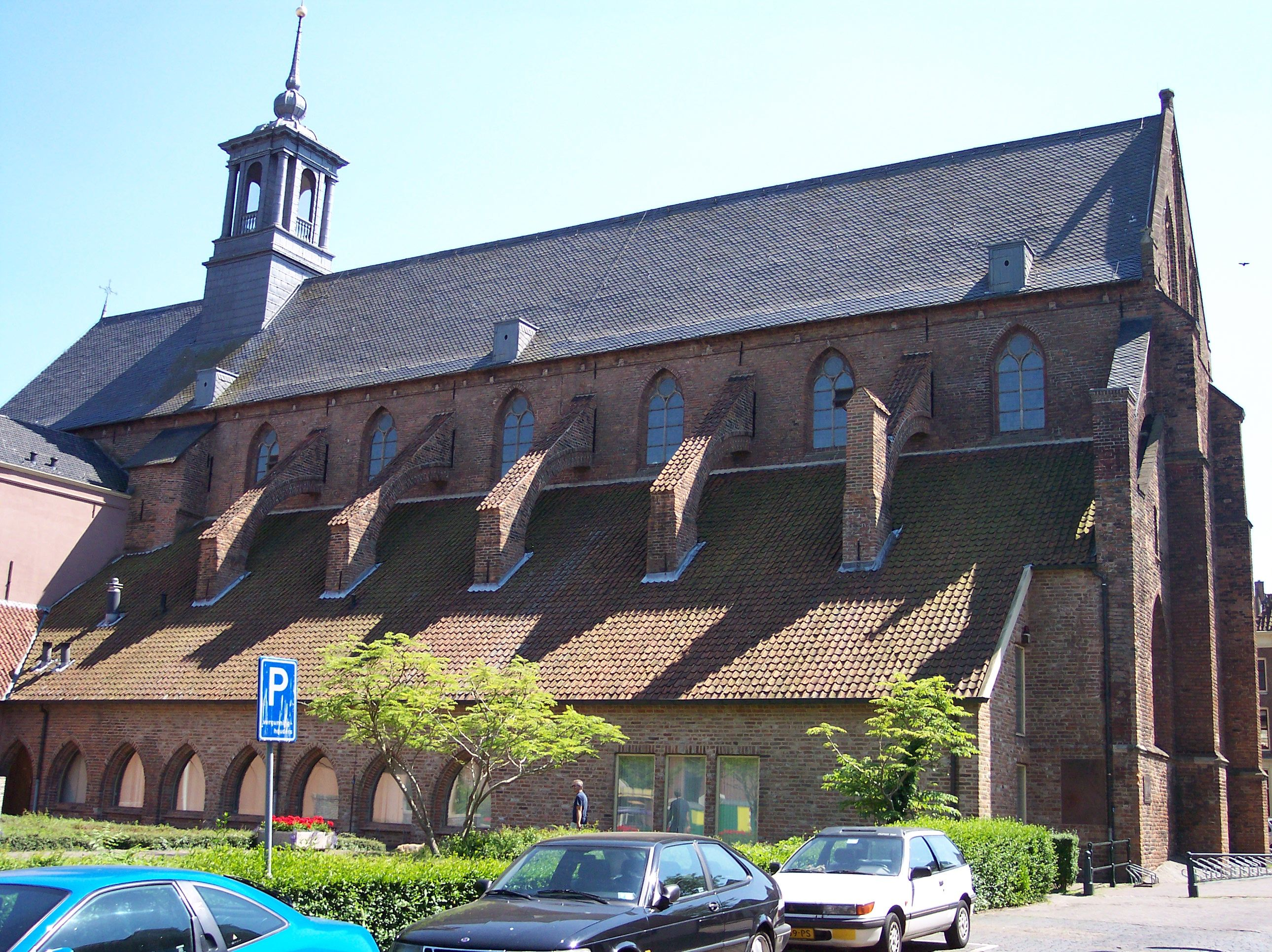 Bruderkirche, Zutphen, Niederlande. Heutzutage ein Bibliothek